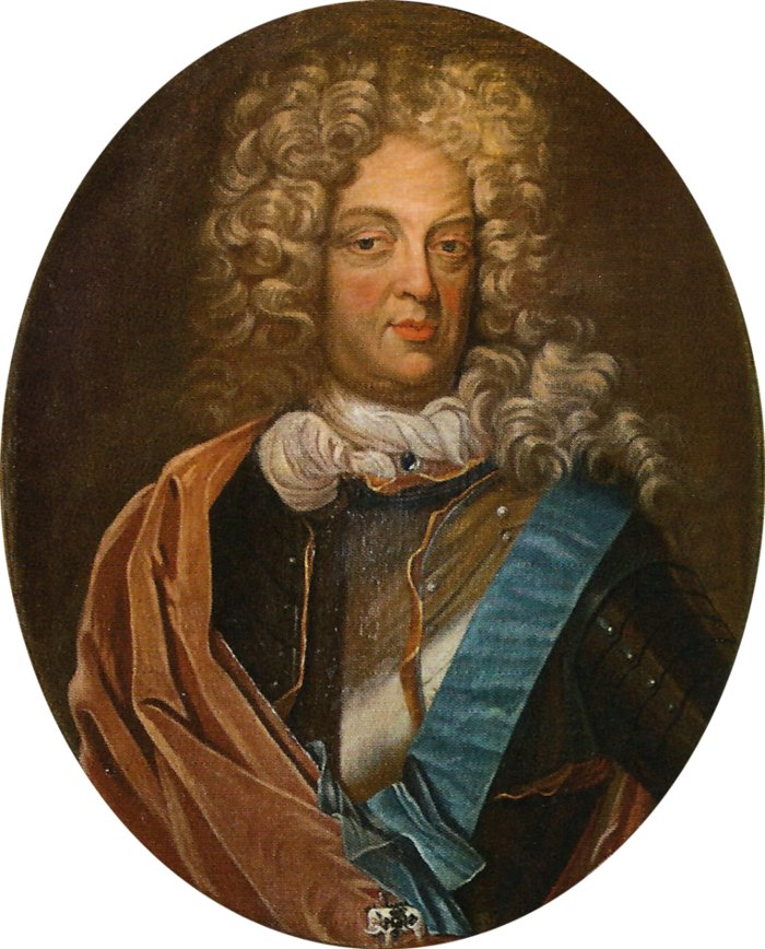 Markgraf Christian Ernst von Brandenburg-Bayreuth (1644-1712)